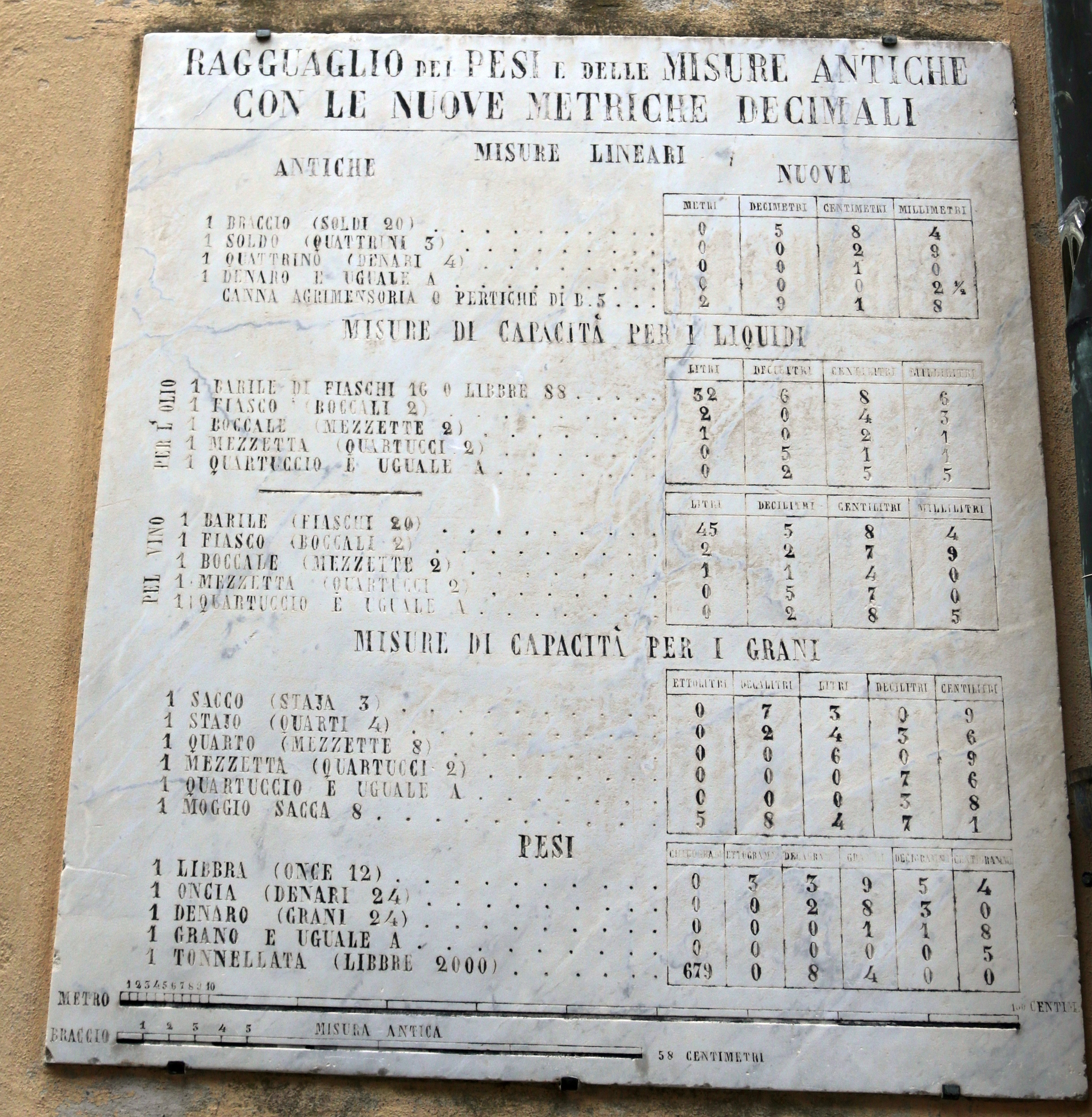 Targa in marmo contenente le tabelle di conversioni fra antiche e nuove unità di misura (1860/1861) all'epoca del plebiscito di annessione della Toscana al Regno d'Italia